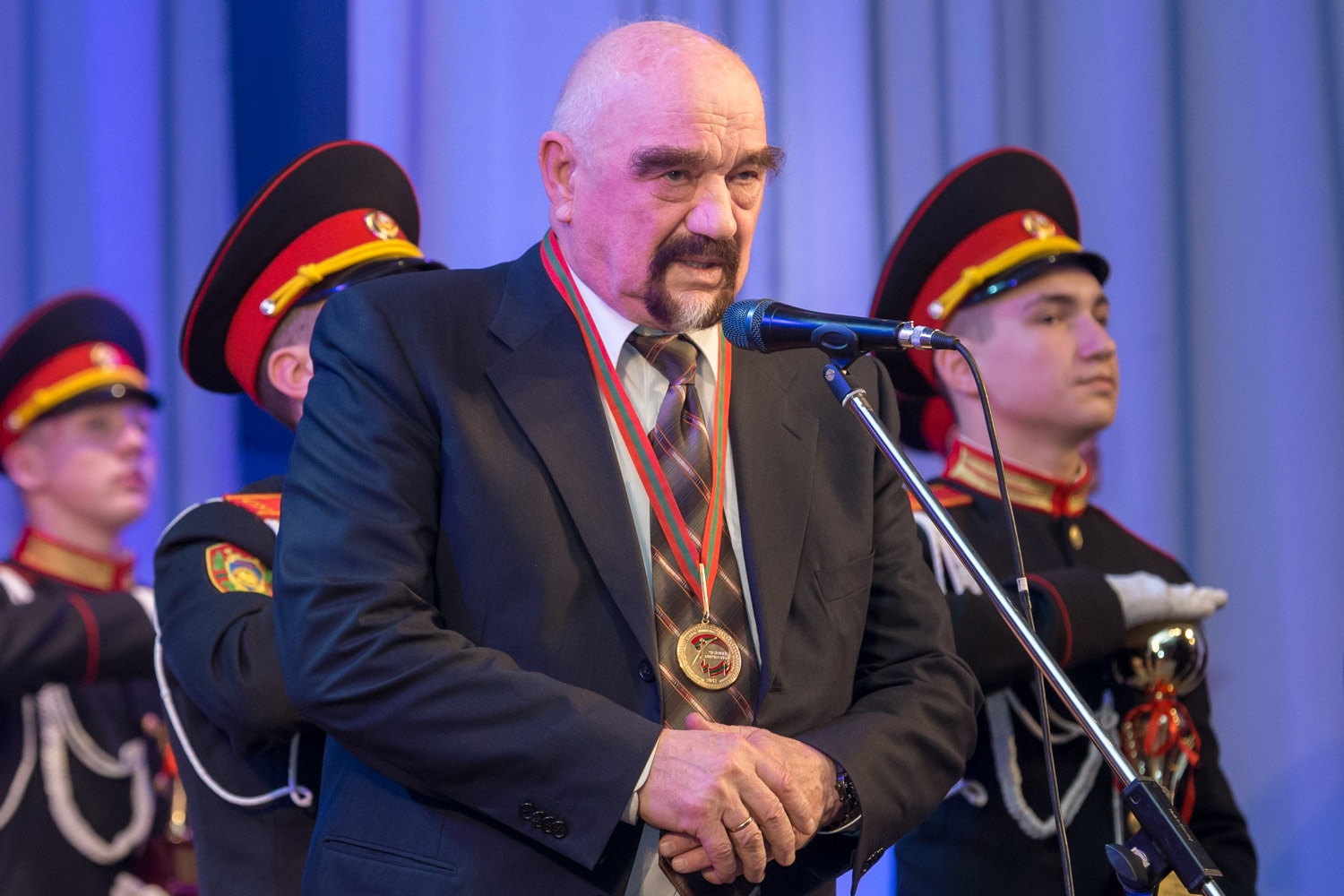 Игорь Смирнов – человек года Приднестровья 2016 в номинации «Человек Отечества»